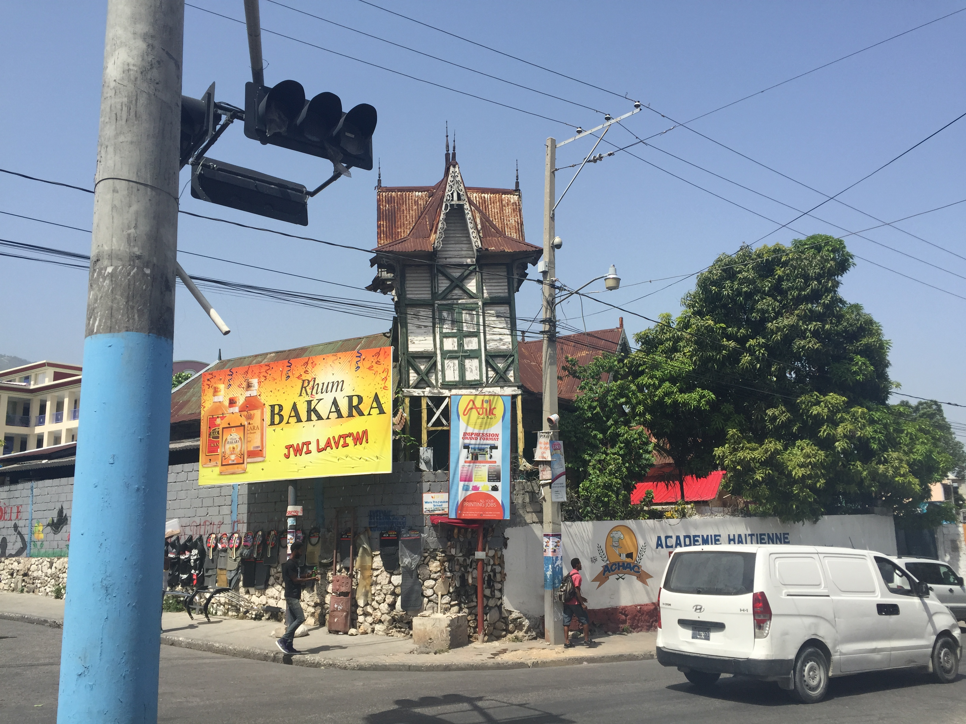 Bois Verna, Port-au-Prince, Haiti